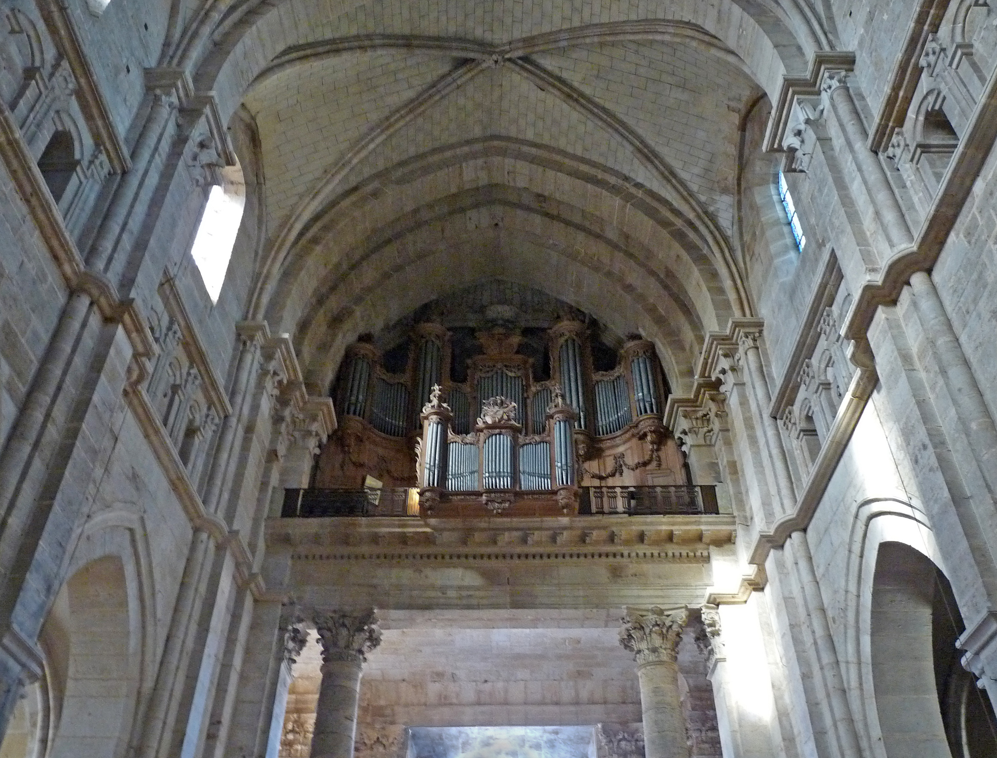 Langres (Haute-Marne, France), cathédrale Saint-Mammès, dans le buffet de 1715 pour l'orgue de Jean Treuillot pour l'abbaye de Morimond, instrument d'Haerpfer-Ermann de 1974, relevé en 1994.